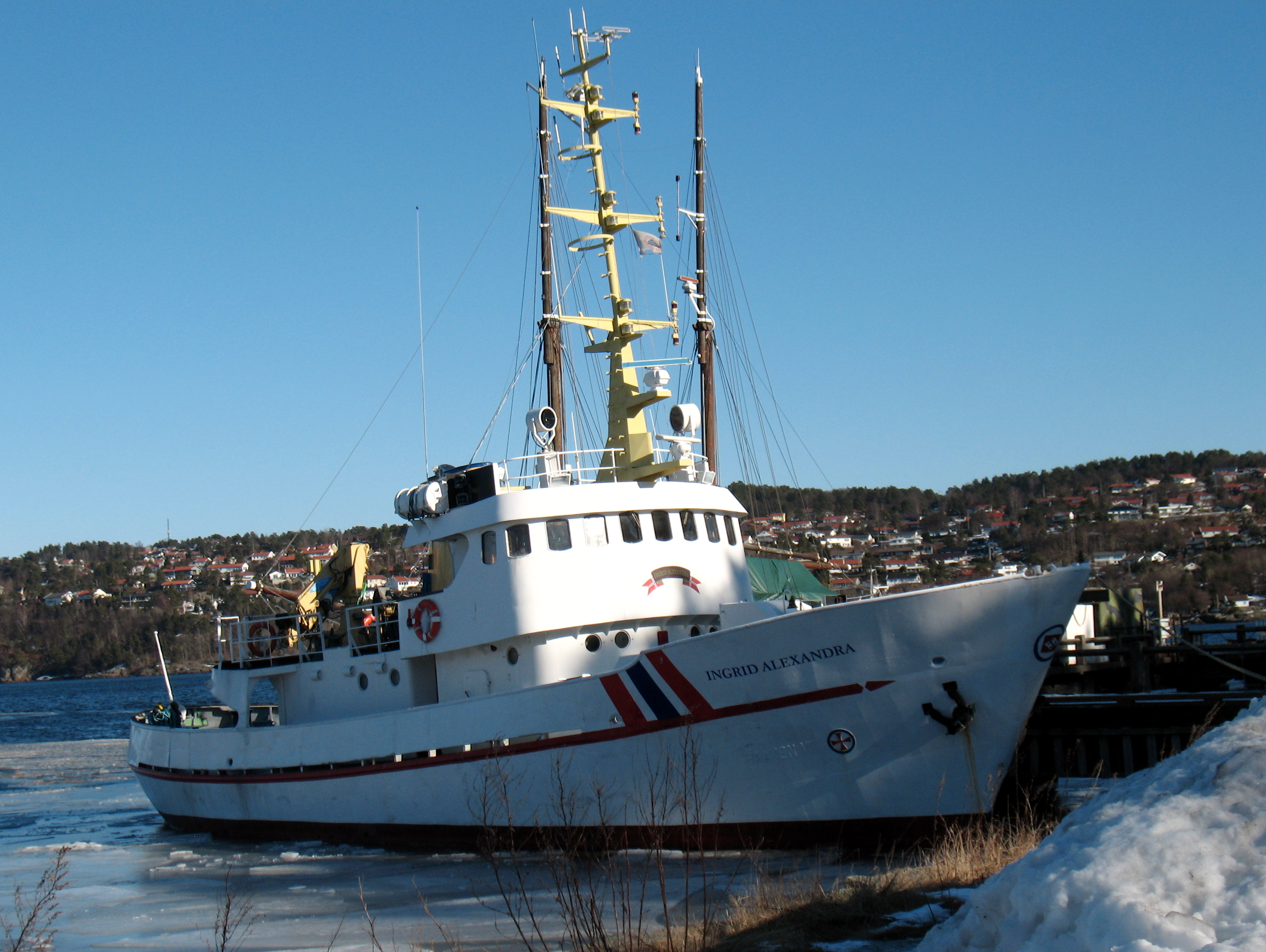 MS «Ingrid Alexandra» ex MS «Torungen» ex R/S 61 «Haakon VII» til havn i Marvika i Kristiansand ved Redningsselskapets base. Se shipsforsale.se for mer informasjon.